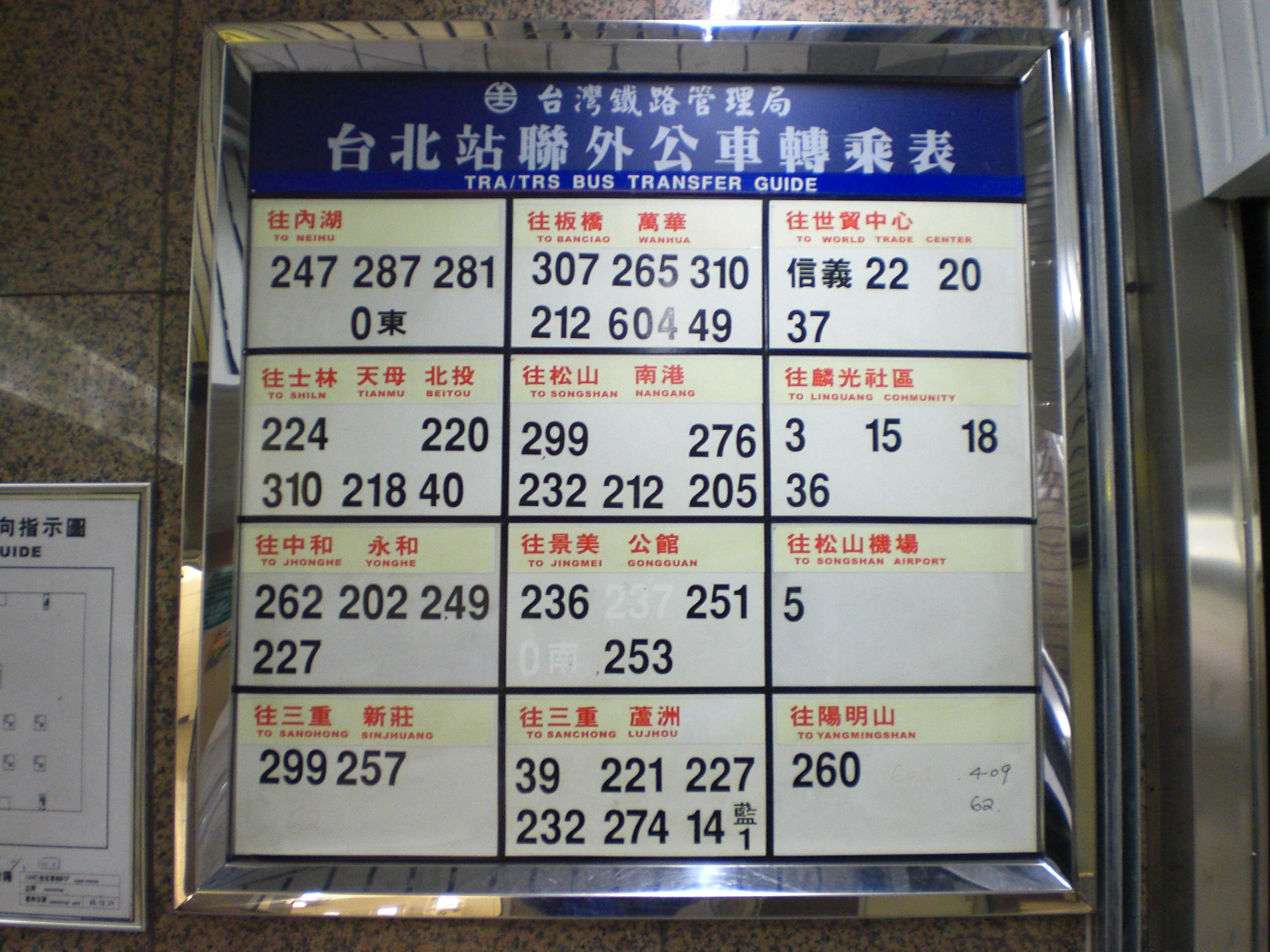 中文（台灣）: 2013年1月27日的台北車站聯外公車轉乘表